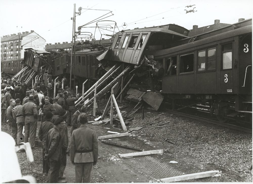 Järnvägsolyckan vid Gubbero (Göteborg) 17 september 1940